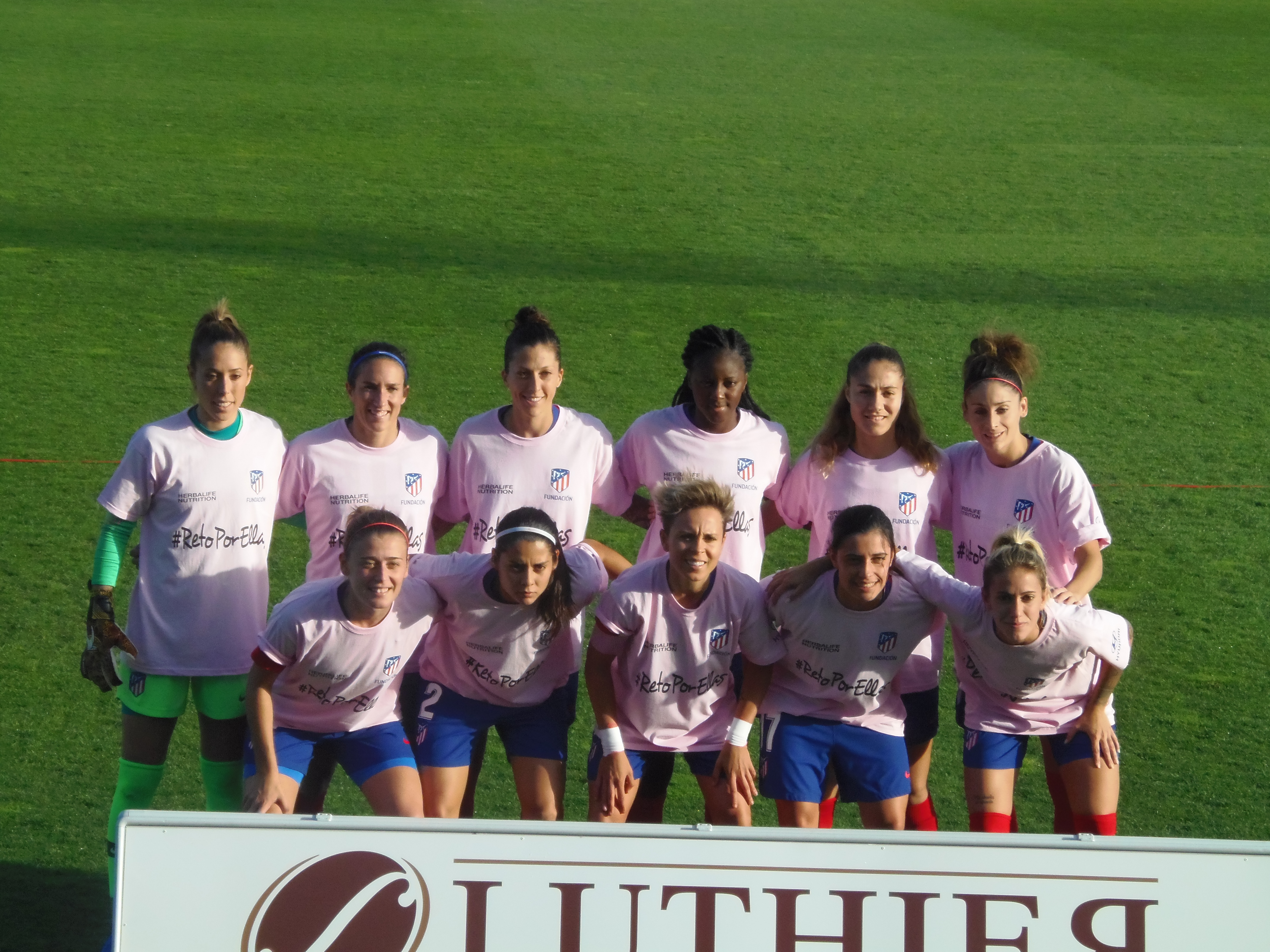 El equipo del Atlético de madrid femenino posando antes de su encuentro ante el Madric C.F.F. el 21 de octubre de 2018